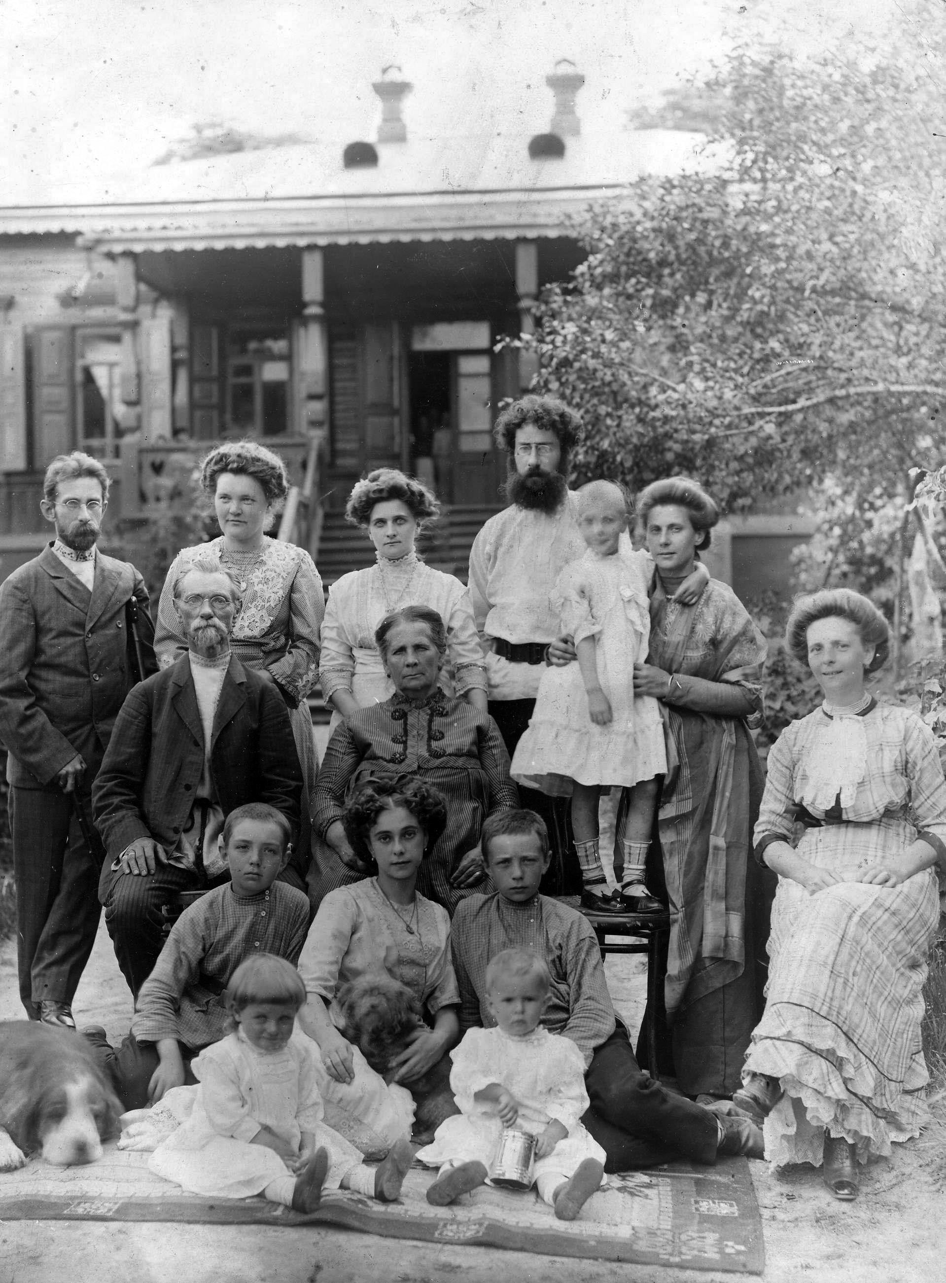 Родные и близкие В.К. Арсеньева. 1-й ряд, слева направо: Наташа Кондакова, Вера Богданова; 2-й ряд: Толя Хлопонин, Мария Клавдиевна, Серёжа Хлопонин; 3-й ряд: Клавдий Фёдорович и Руфина Егоровна; 4-й ряд: Клавдий Клавдиевич и его жена Елена, Лидия Клавдиевна и её муж Иннокентий Михайлович Кондаков. Зоя Клепш, Руфина Клавдиевна Клепш, Мария Клавдиевна. Хутор Дубовщина. 1912 г.